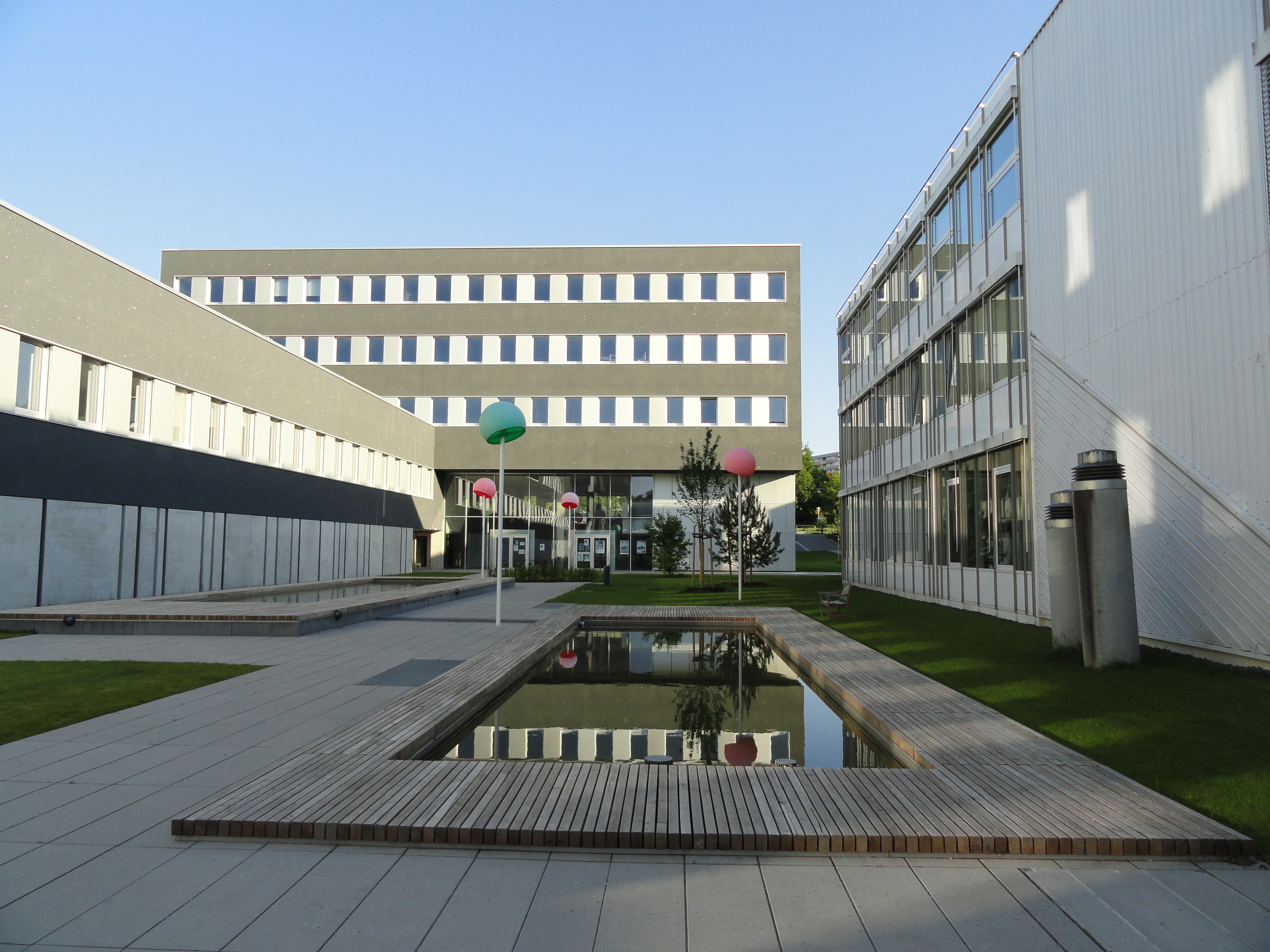 Hochschule Kempten, 2012 (mit schwarzem Neubau, auch "Swarowski-Haus" genannt)